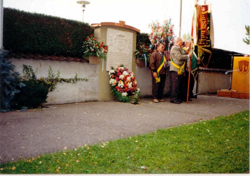 Sălbăgelu Nou/Eichenthal (Banat): Im Friedhof von Asbach-Bäumenheim steht seit den 1980er Jahren eine Gedenktafel in Erinnerung an alle Eichenthaler Verstorbenen, Gefallenen und Vermissten.